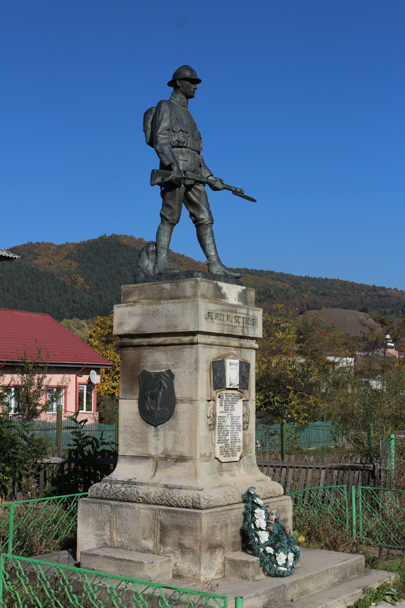 Monumentul Eroilor din primul război mondial